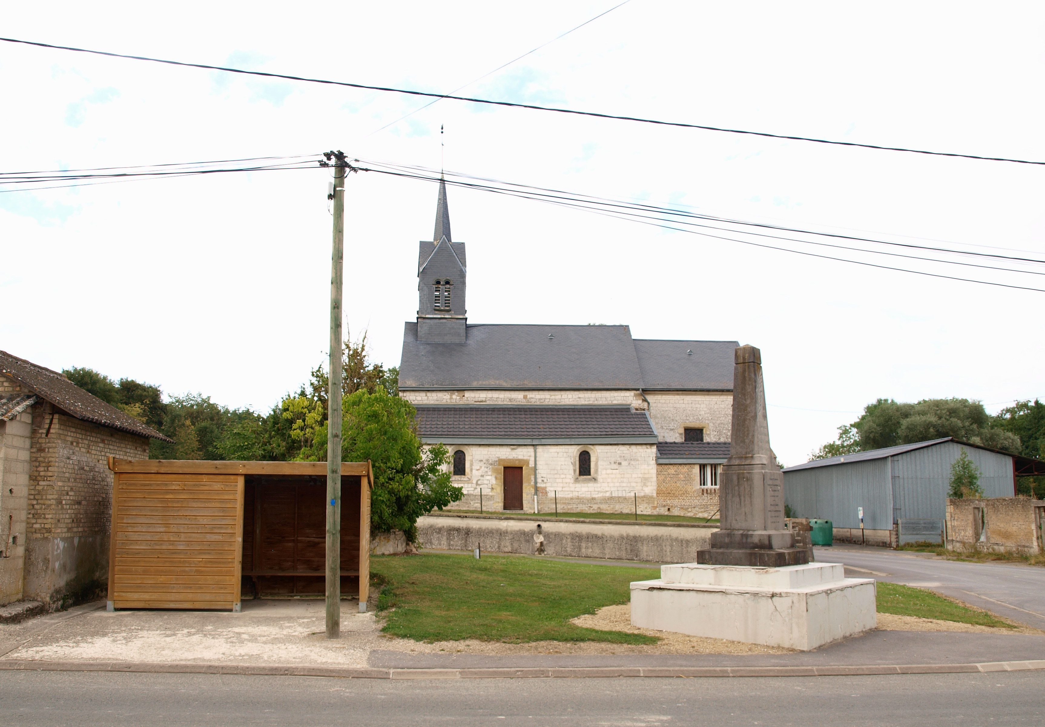 Saint-Pierre-à-Arnes (Ardennes, France) ; place de la mairie, photographiée depuis la mairie avec abribus, monument aux morts & église.